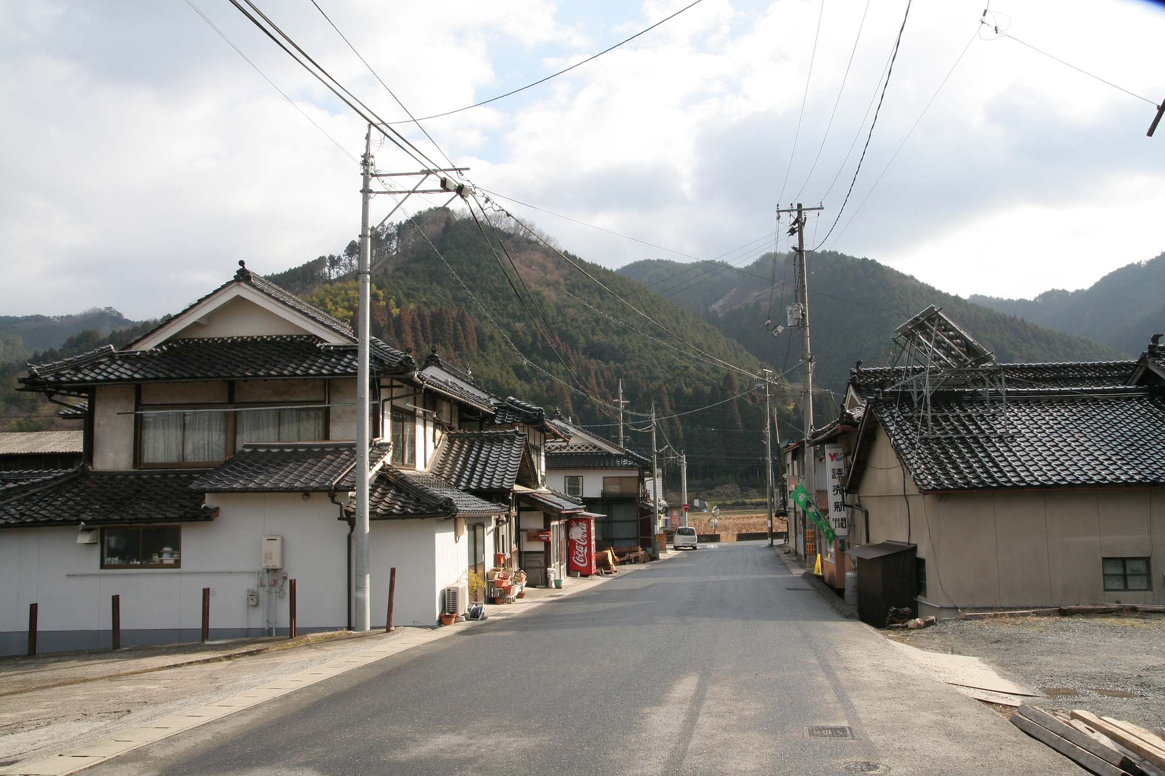 月田駅周辺の様子